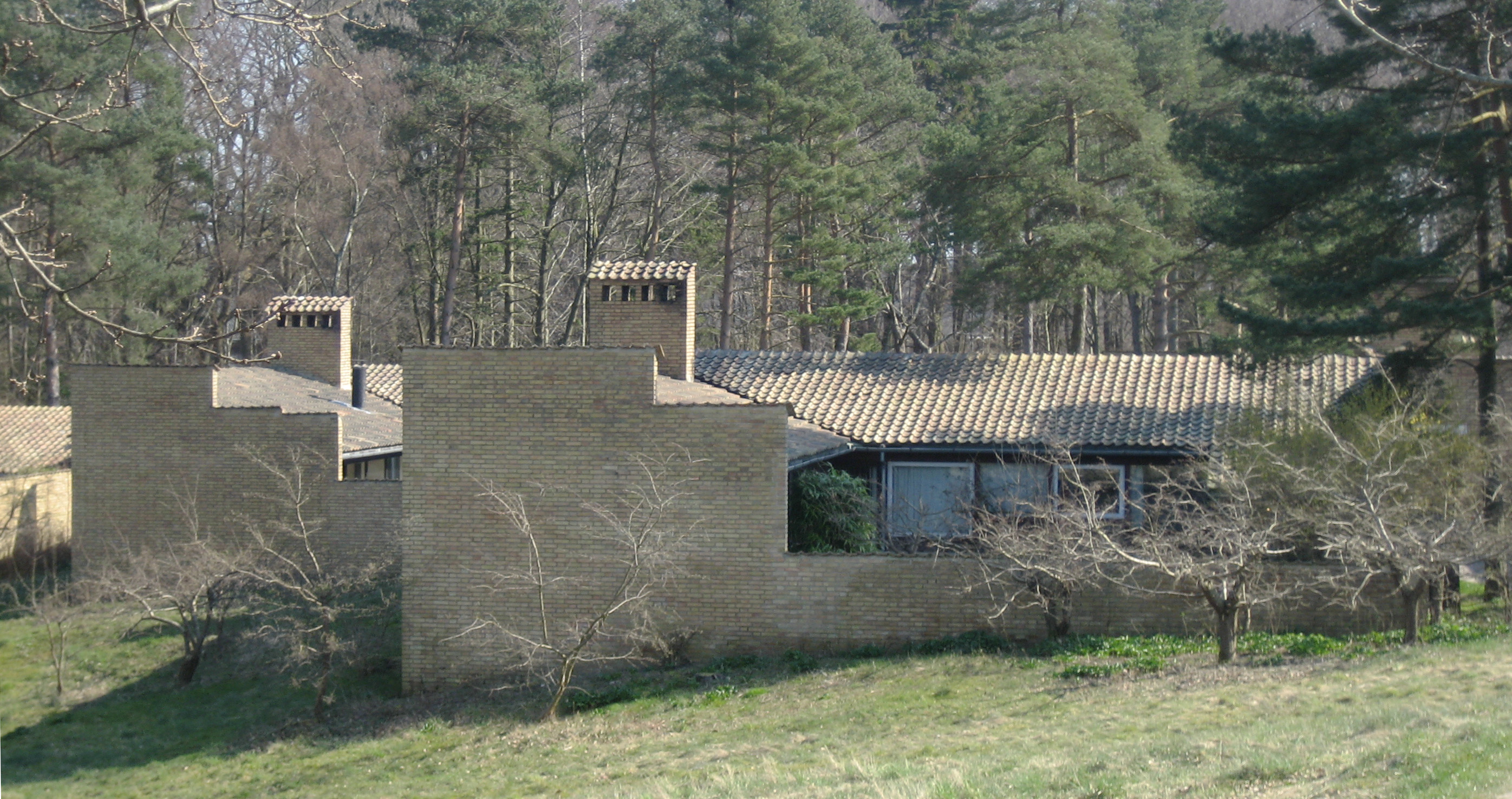 Romerhusene, Helsingør